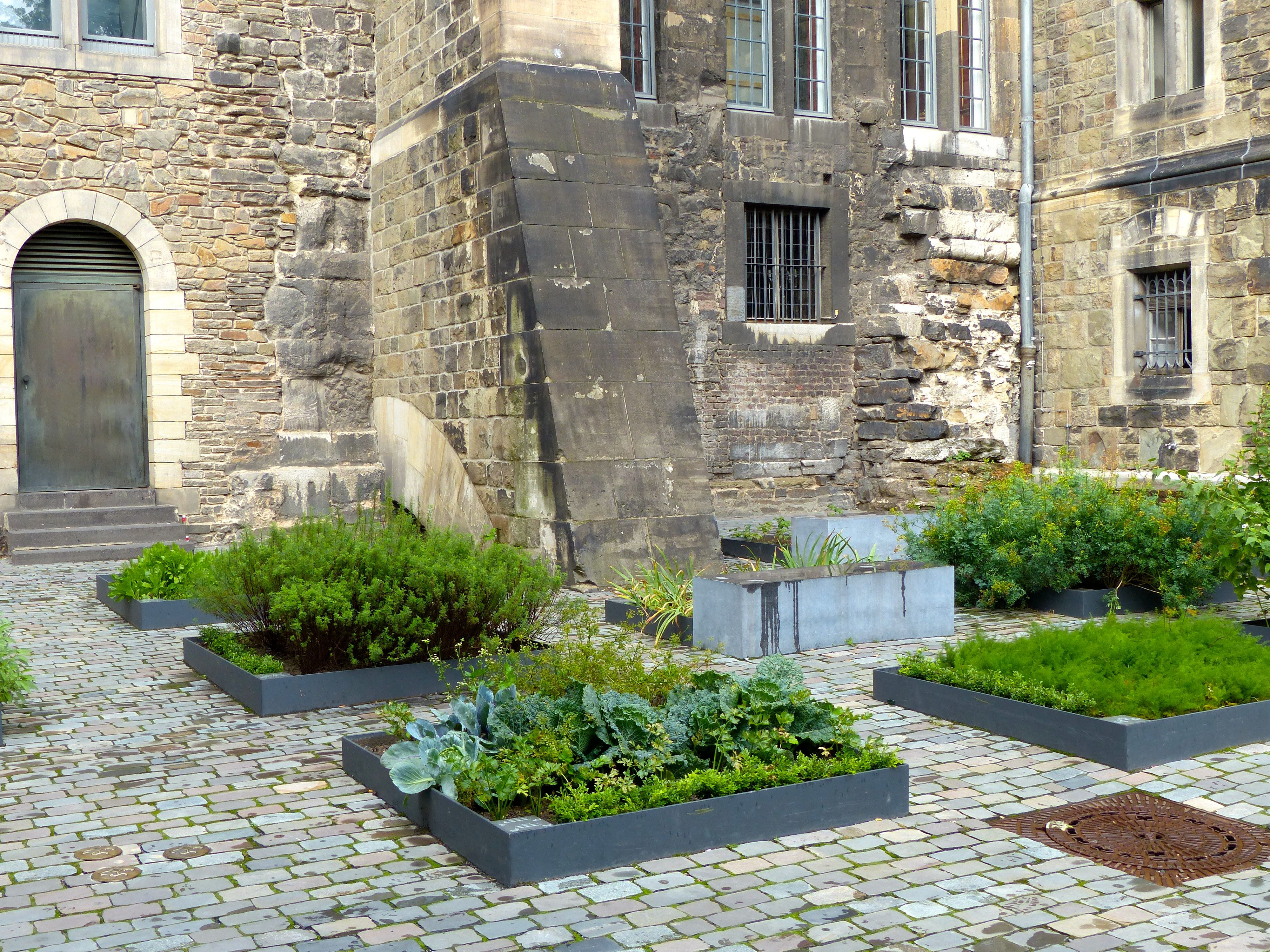 Neuangelegter Karlsgarten auf der Rückseite des Aachener Rathauses